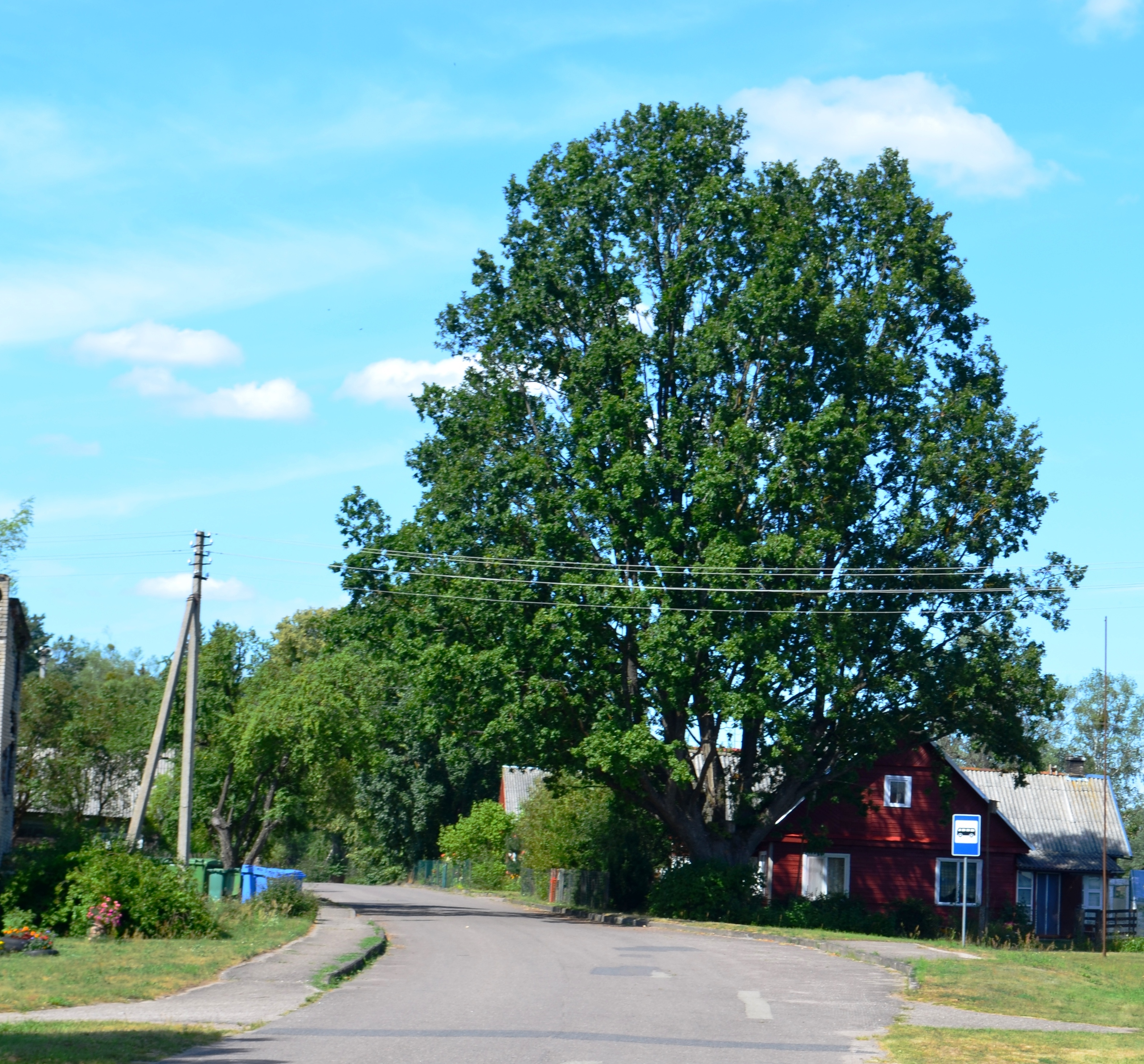 Kabelių ąžuolas, Varėnos r.